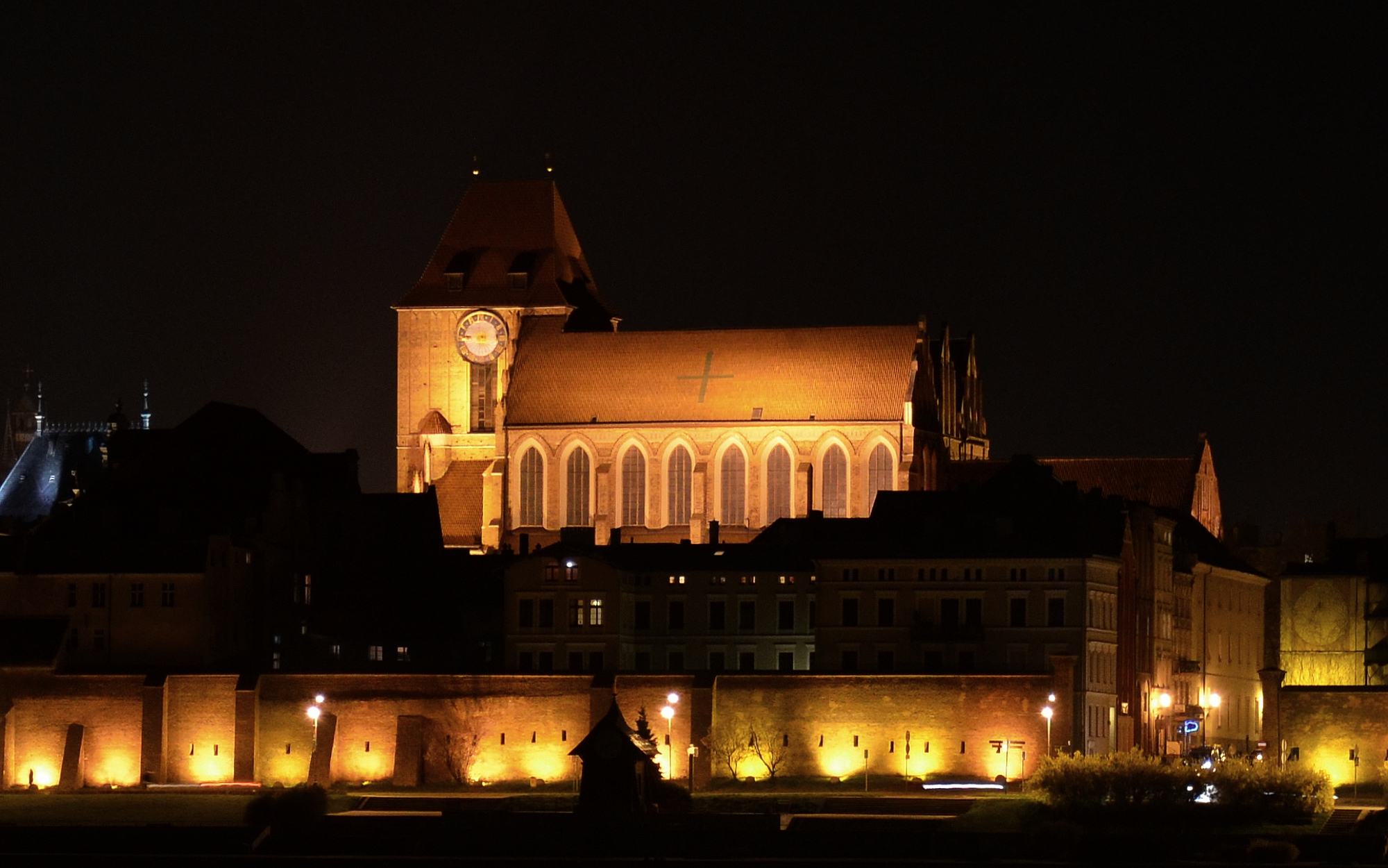 Bazylika katedralna św. Jana Chrzciciela i Jana Ewangelisty